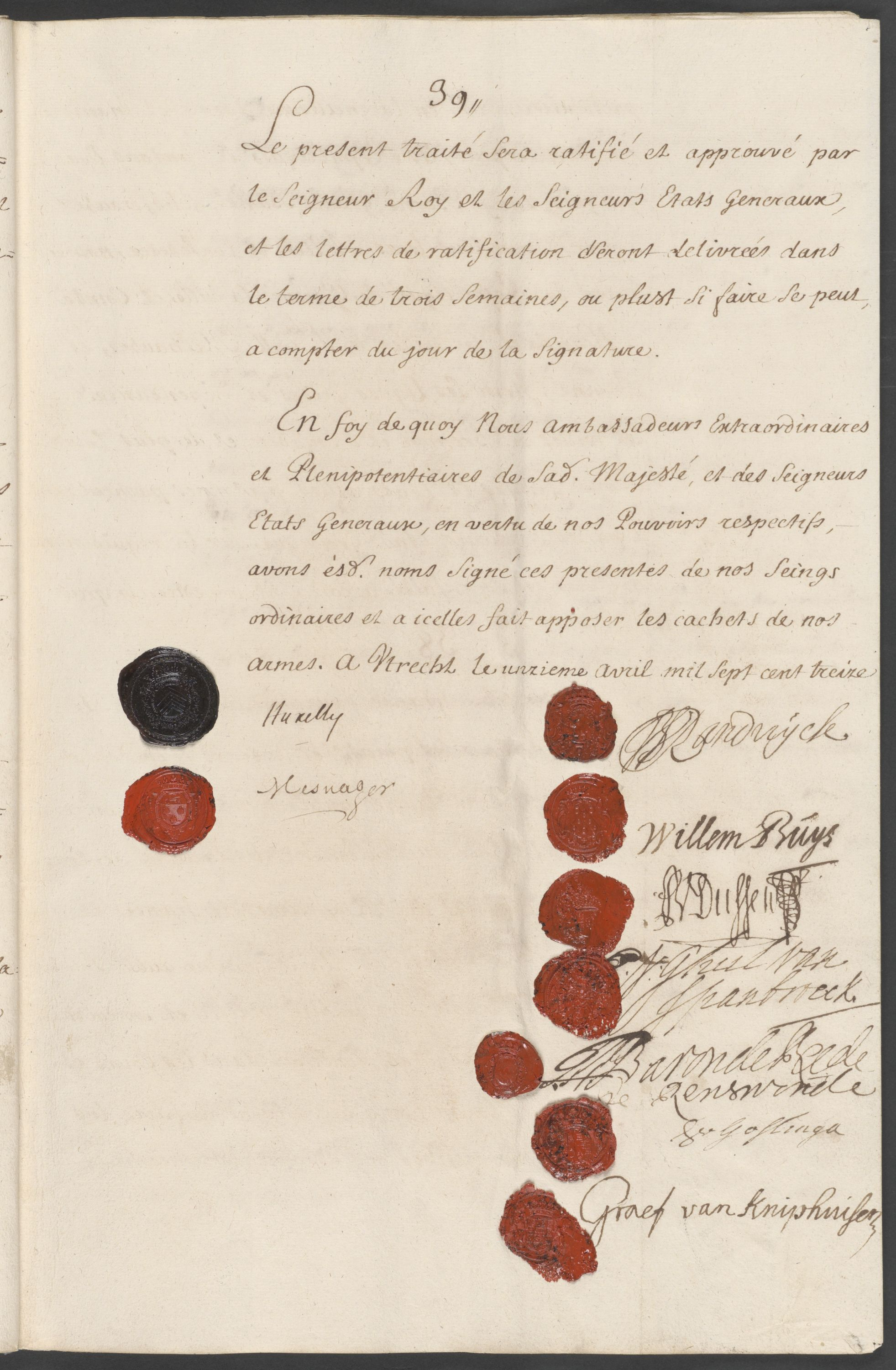 Vrede van Utrecht, 1713. Akte van volmacht te Versailles uitgevaardigd door de koning van Frankrijk om vrede met de Staten-Generaal te sluiten, 1713 maart 14. Kopie. Akte van traktaat van vrede met separate artikelen inzake de vrede met Spanje en de Zuidelijke Nederlanden te Utrecht gesloten tussen de Staten-Generaal en de koning van Frankrijk, 11 april 1713. Akte-declaratoir waarbij de Staten-Generaal en de koning van Frankrijk bepalen dat de Spaanse Nederlanden niet zullen worden overgedragen voor Sardinië aan Beieren gekomen is, 11 april 1713.